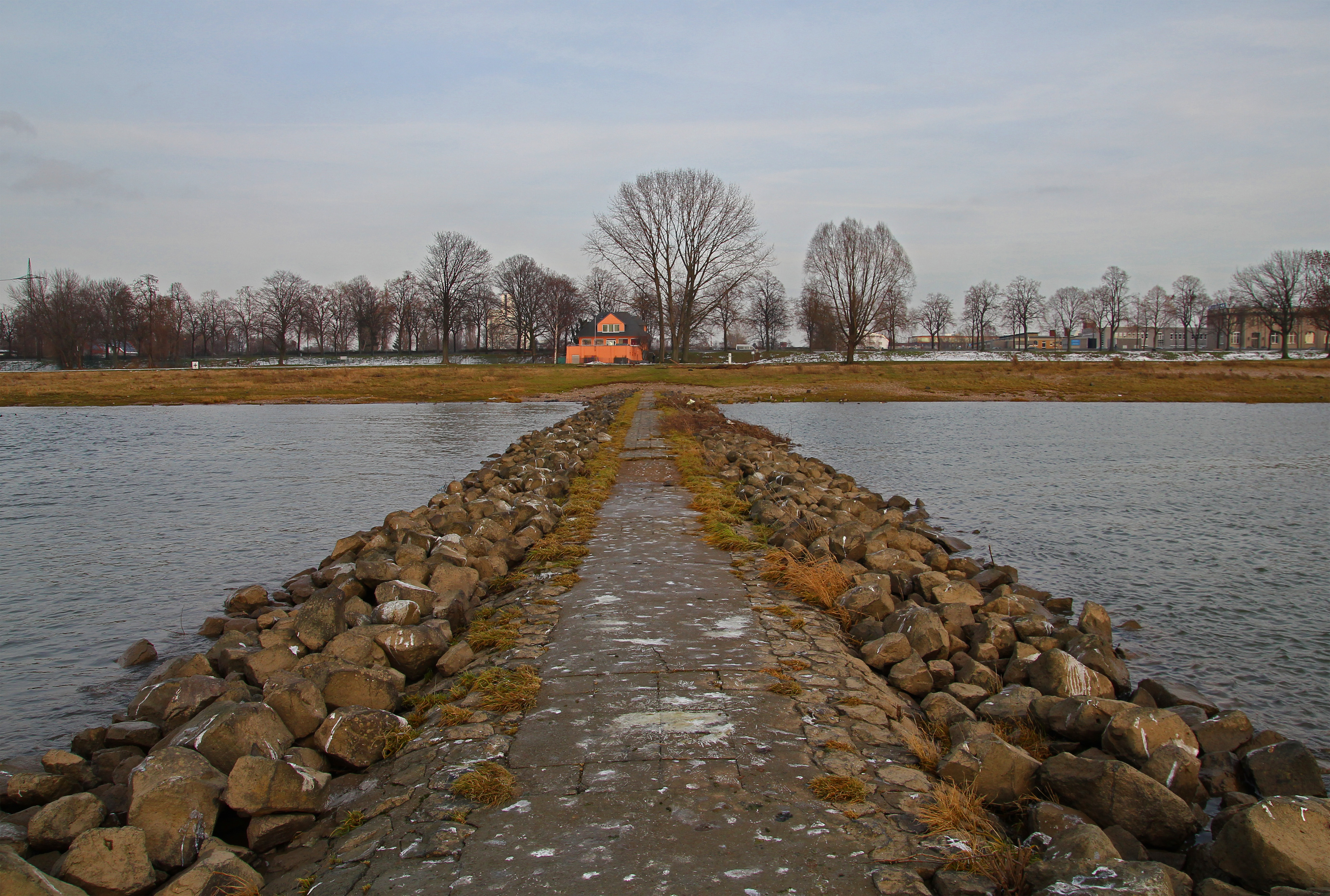 Der Rhein in Köln von den Poller Wiesen. Eine Landzunge von den ehemaligen Poller Köpfen. Blick in Richtung Ufer.